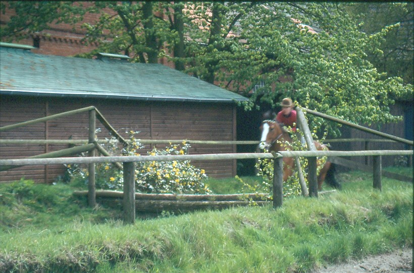 Sprunggarten Westfälische Reit- und Fahrschule 1984